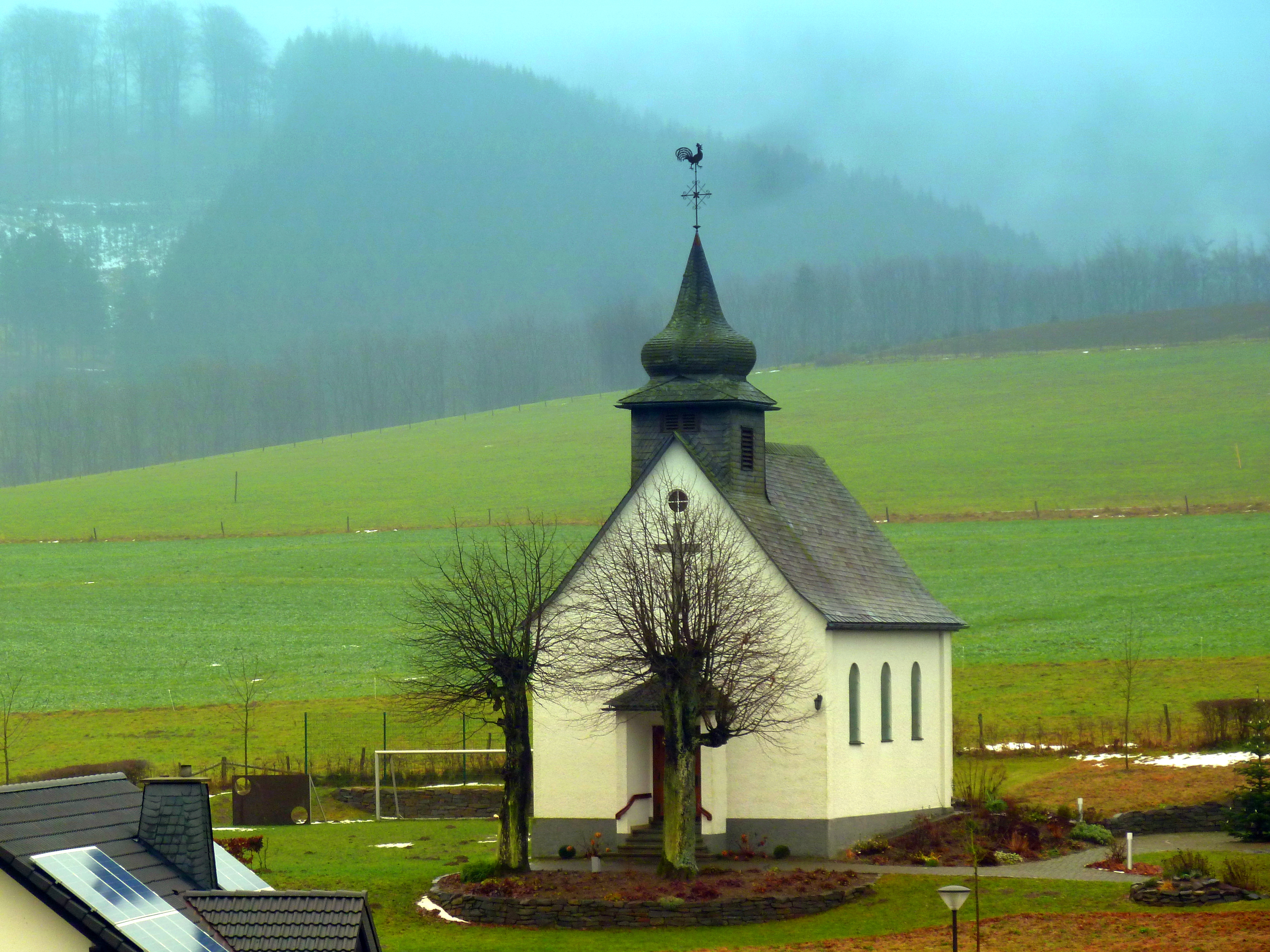 Die kath. Dorfkapelle in Oberrahrbach wurde Anfang der 50er Jahre errichtet